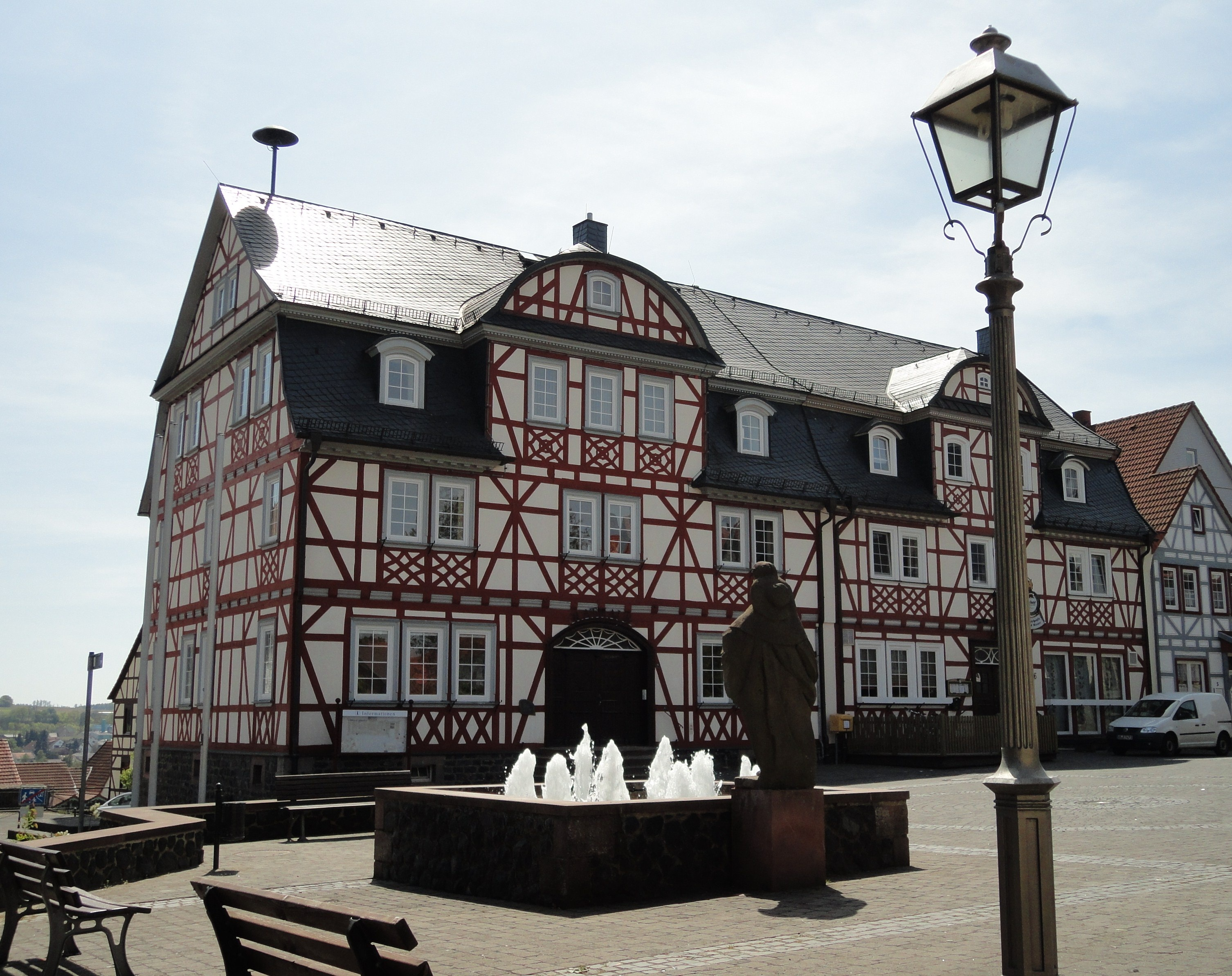 Rathaus von Herbstein, erbaut 1910